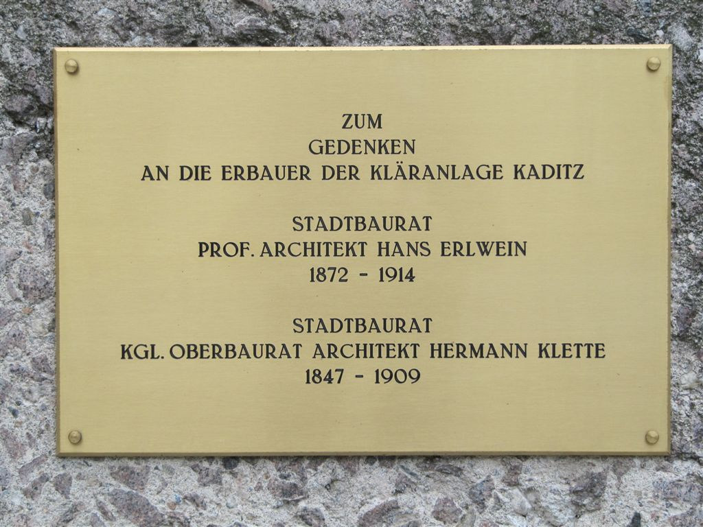 Gedenktafel für Hermann Klette und Hans Erlwein auf dem Gelände der Kläranlage Dresden-Kaditz Inschrift: Zum Gedenken an die Erbauer der Kläranlage Kaditz Stadtbaurat Prof. Architekt Hans Erlwein 1872 - 1914 Stadtbaurat Kgl. Oberbaurat Architet Hermann Klette 1847 - 1909 Inbetriebnahme der Kläranlage am 15. Juli 1910